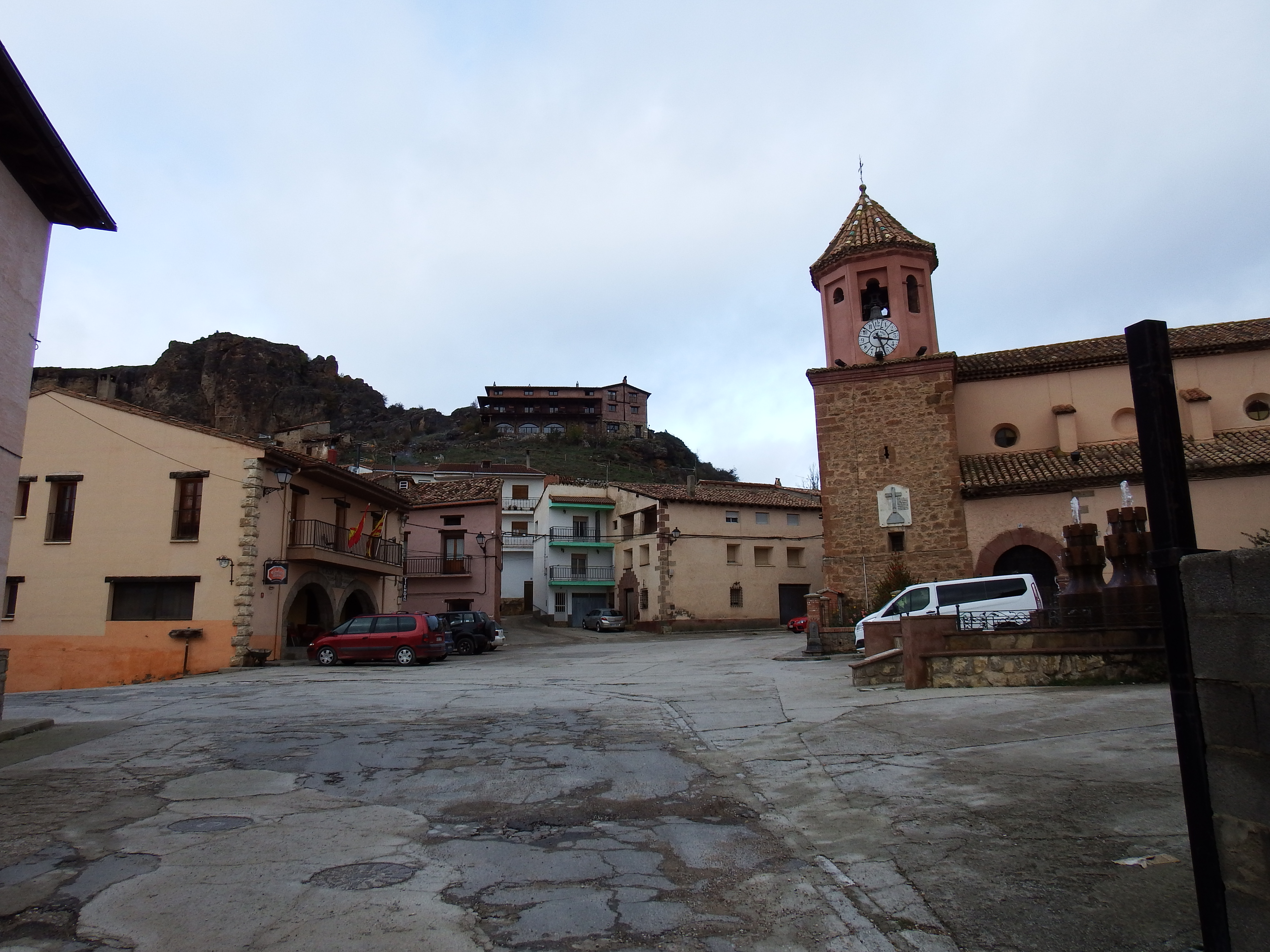 Tramacastilla